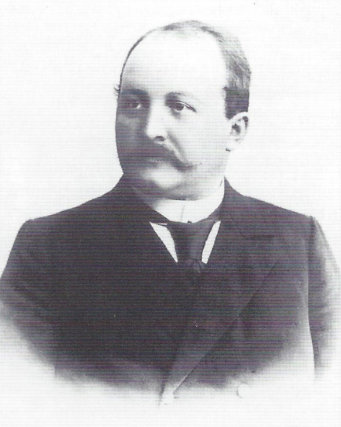 Fotografie von Dr. Edgar Holzapfel, Gründer und Inhaber des Polytechnikums Köthen 1891–1897.